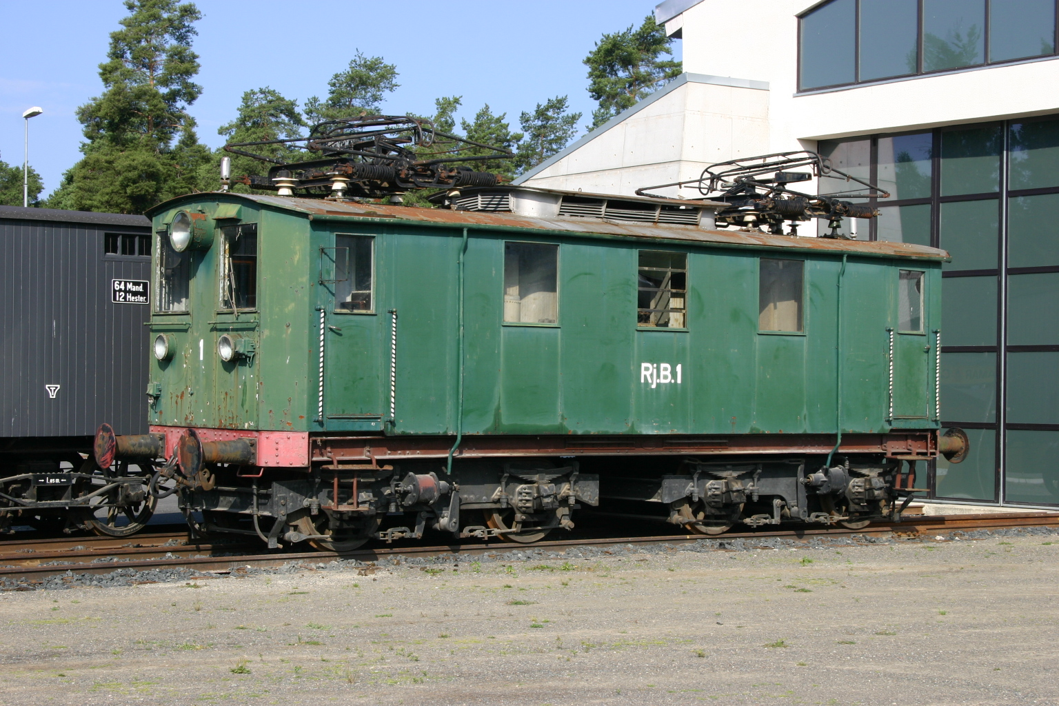 El-Lok El 7.2501 als Rj.B.1 Hamar 02.08.04